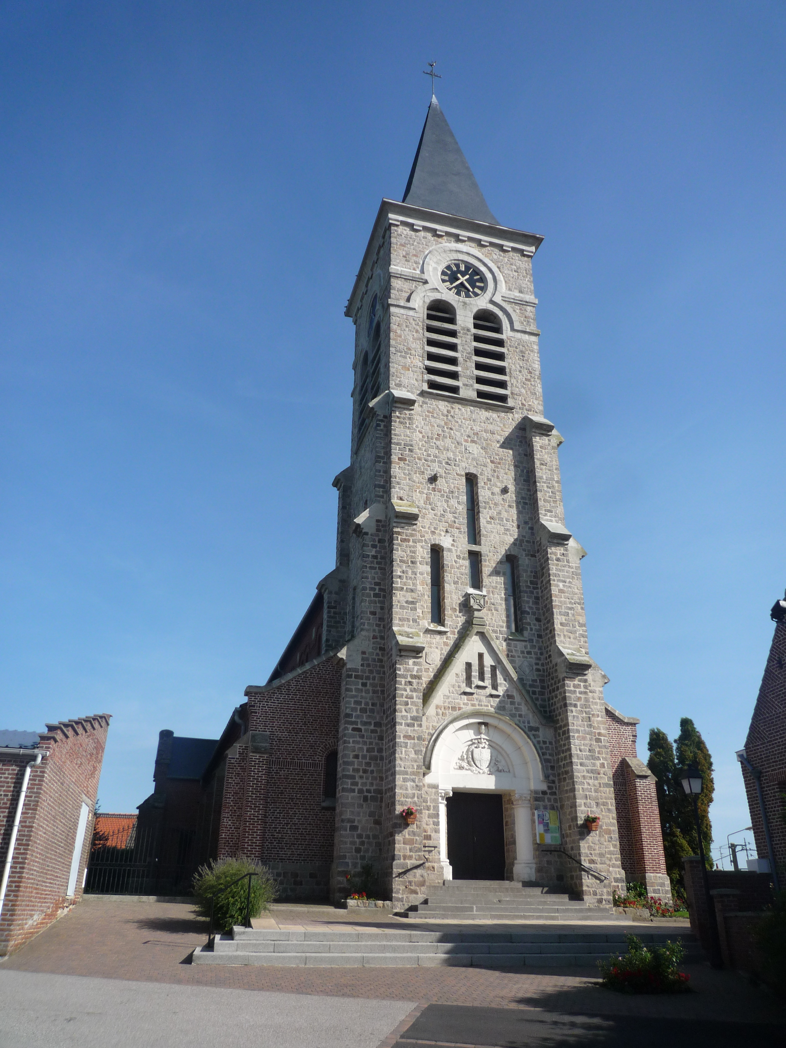 Église Saint-Pierre Saint-Paul de Bugnicourt, Nord, Nord-Pas-de-Calais, France.